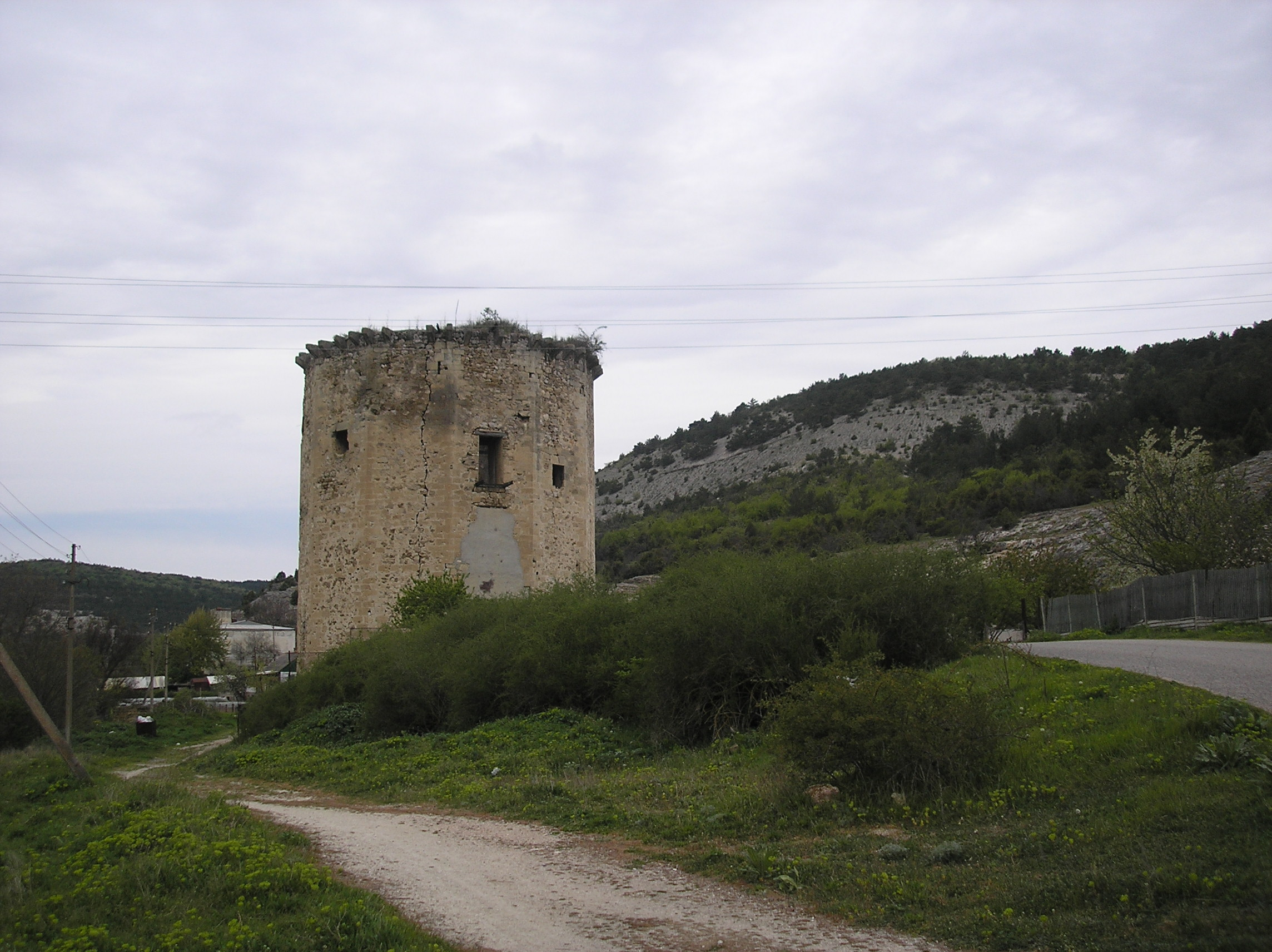 Чоргунська вежа, село Чорноріччя, Севастополь